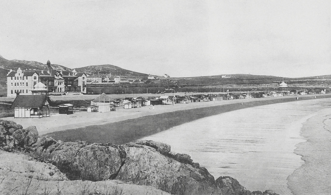 青岛一浴1900年代